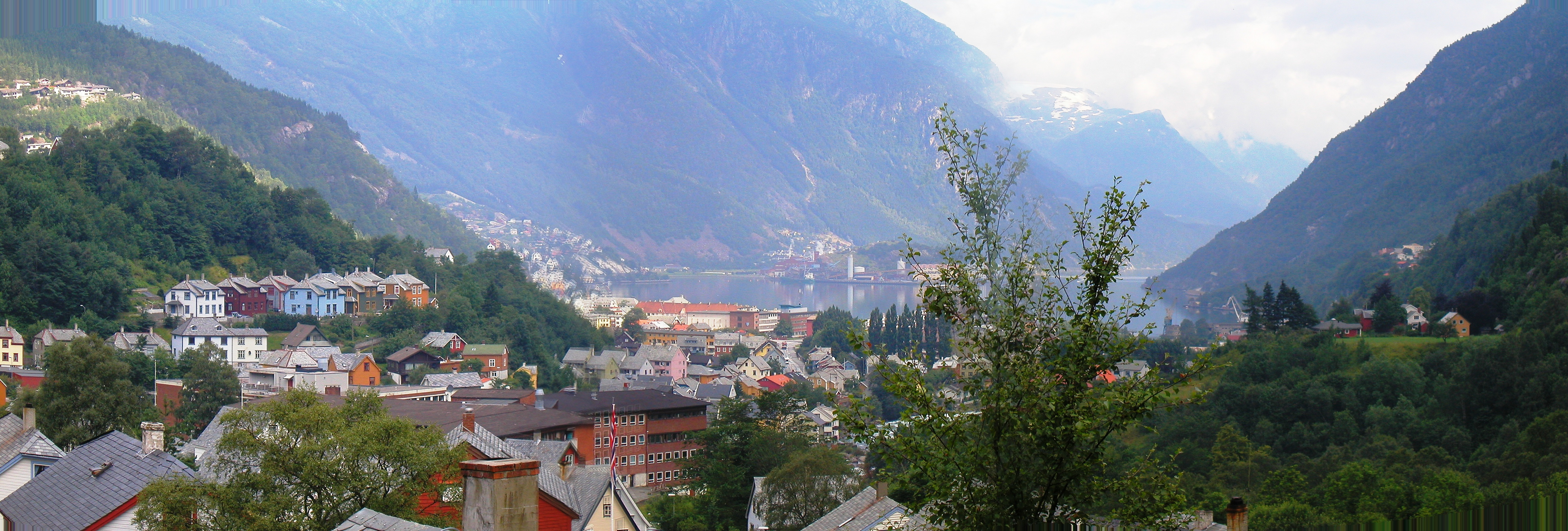 Odda